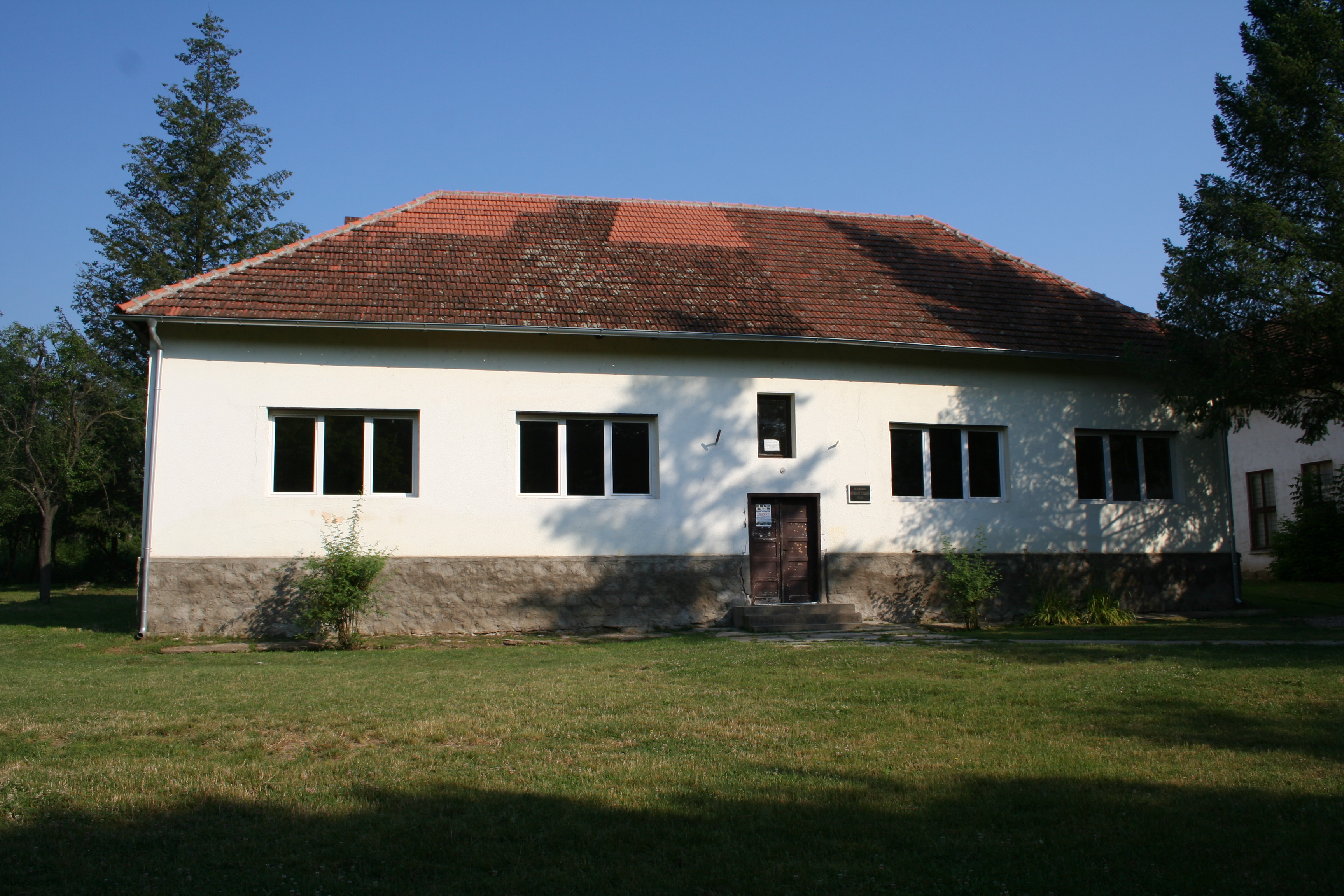 Zgrada škole, Grušić